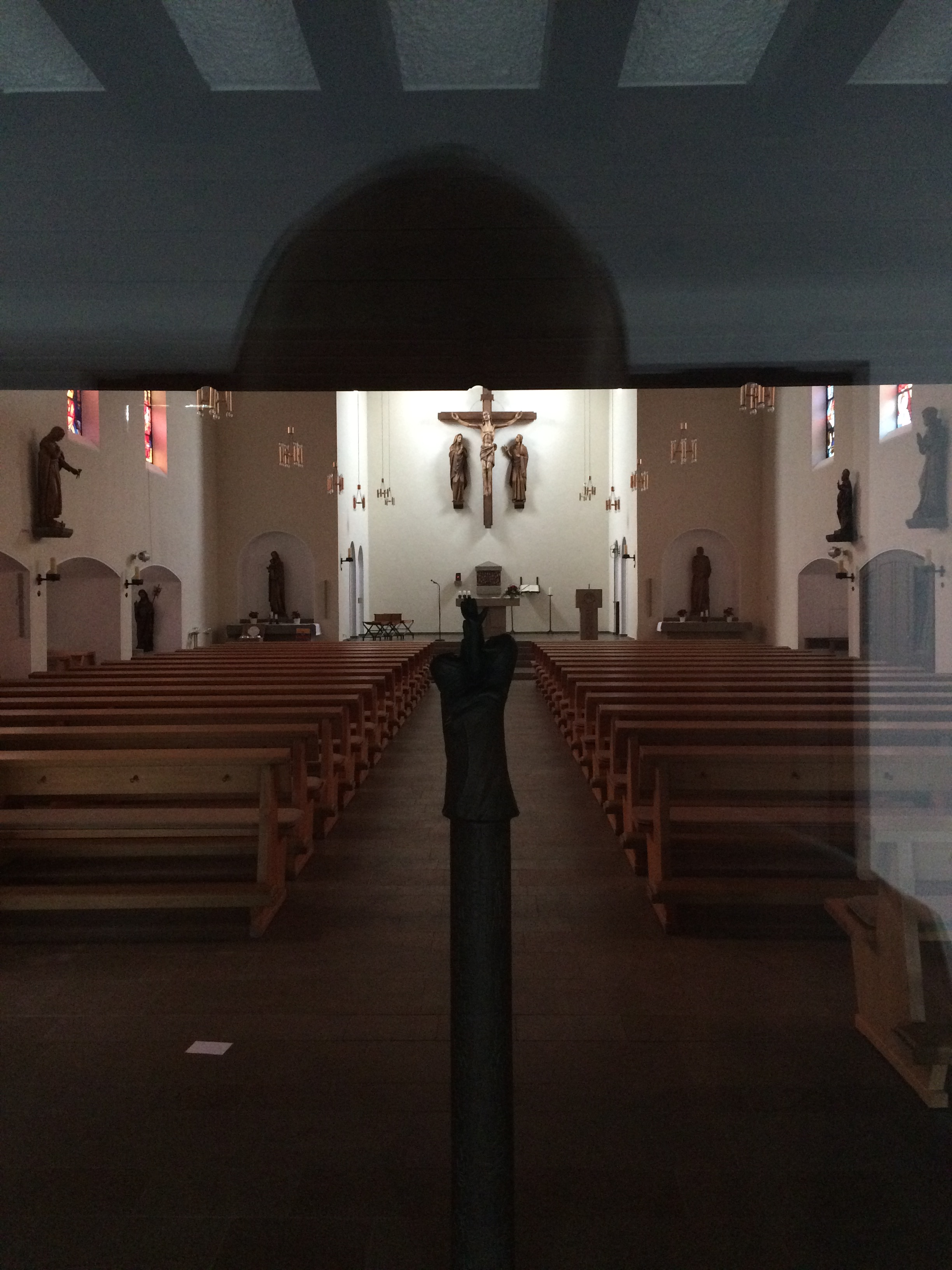 Pfarrkirche St. Mariä Heimsuchung in Sankt Augustin-Mülldorf, eine von acht Kirchen des katholischen Seelsorgebereichs Sankt Augustin.